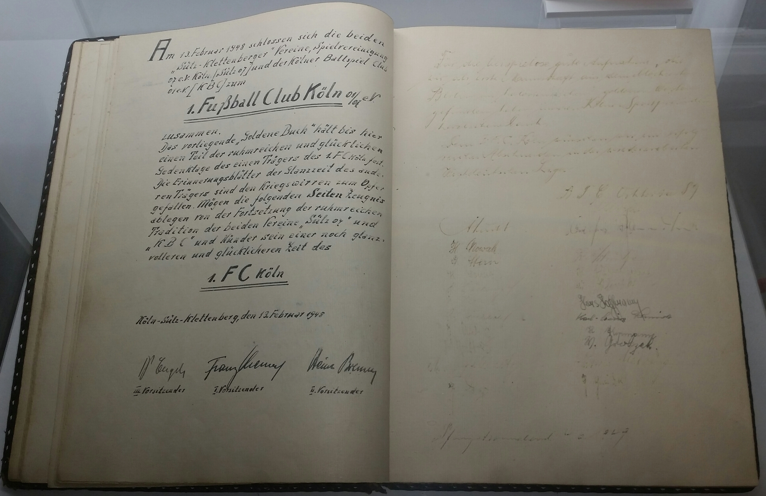 siehe titel